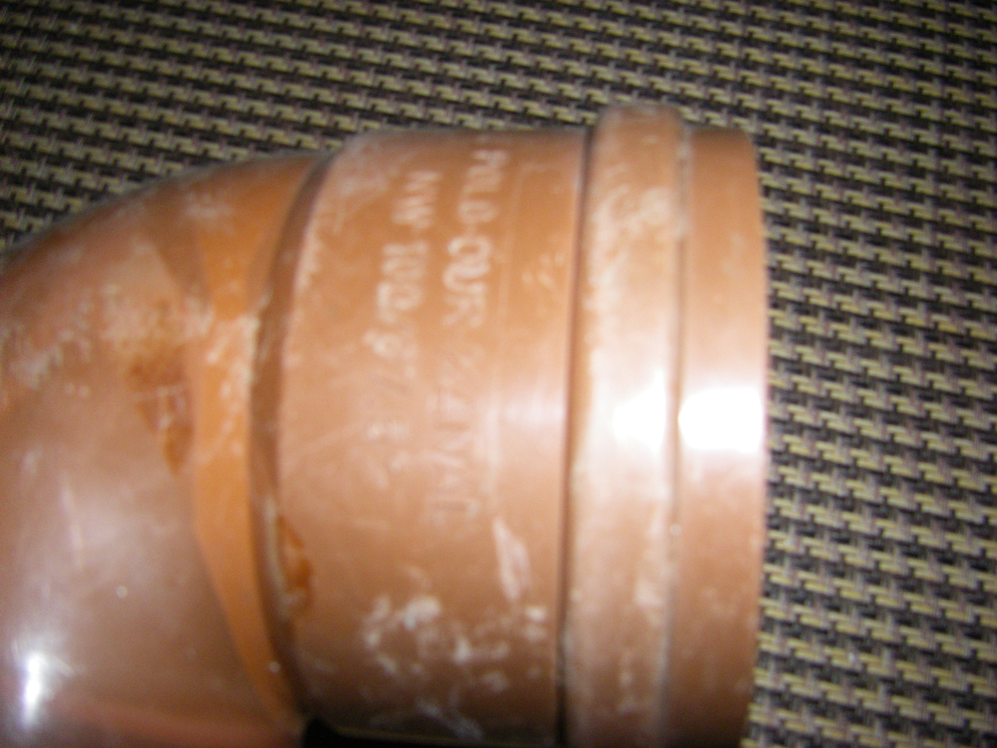 Rohrbogen mit Steckmuffe